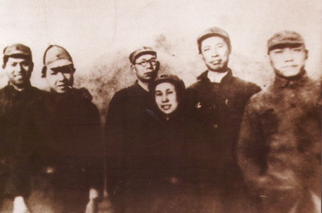 原清志与早期的对外广播工作者在一起